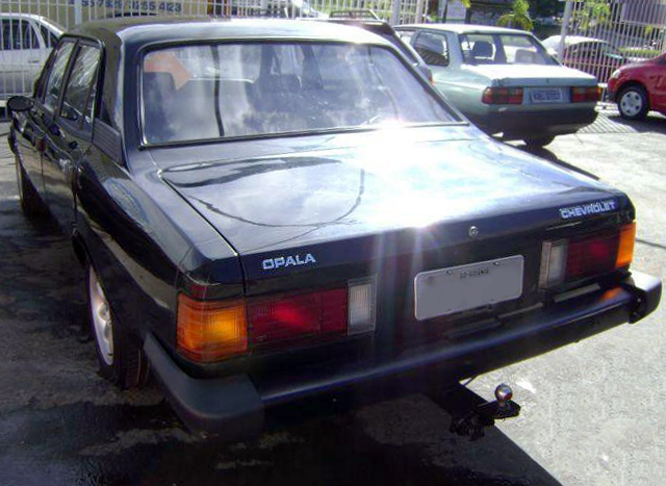 Late model four-door Chevrolet Opala